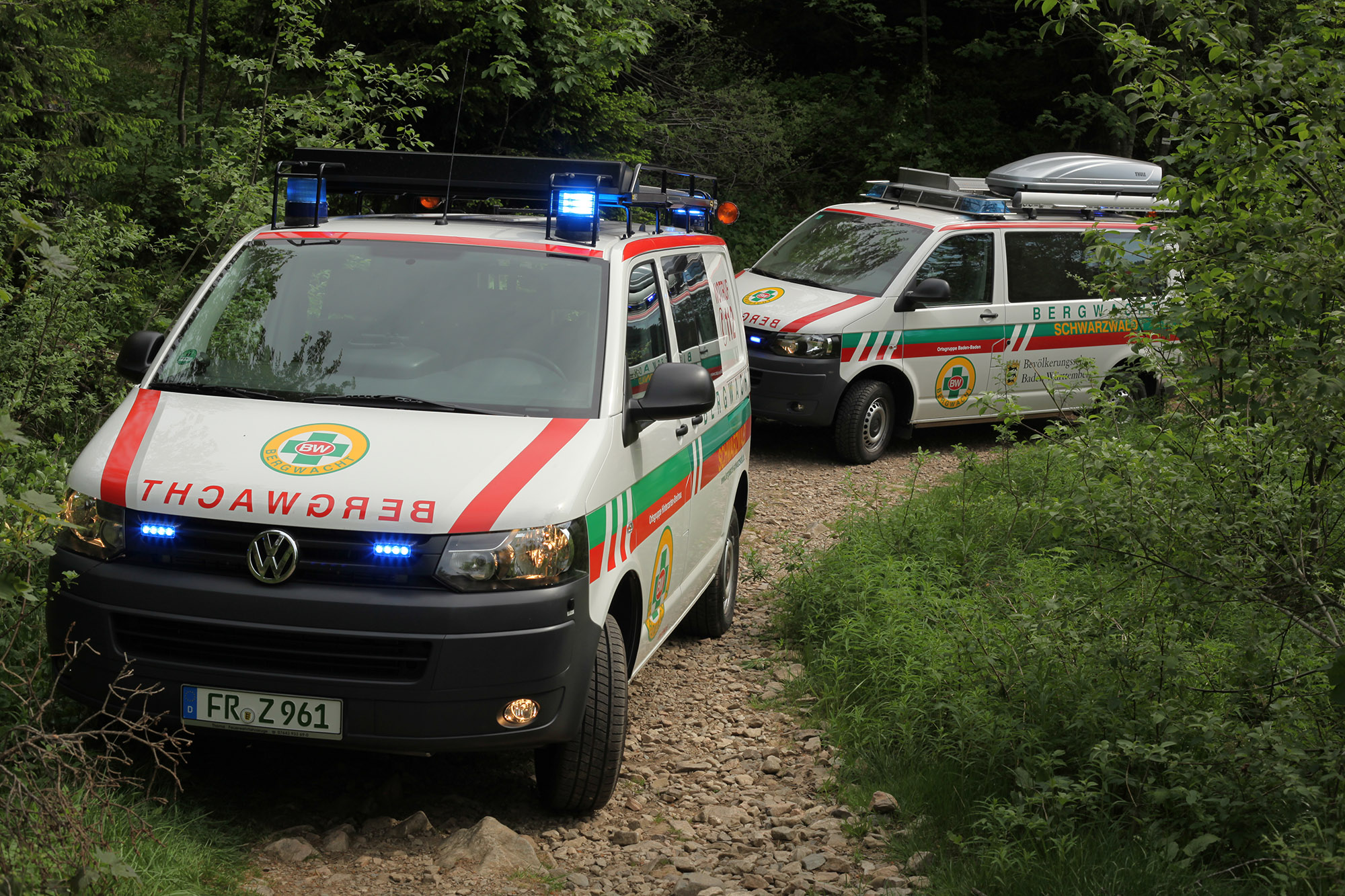 Einsatzfahrzeuge der Bergwacht Schwarzwald